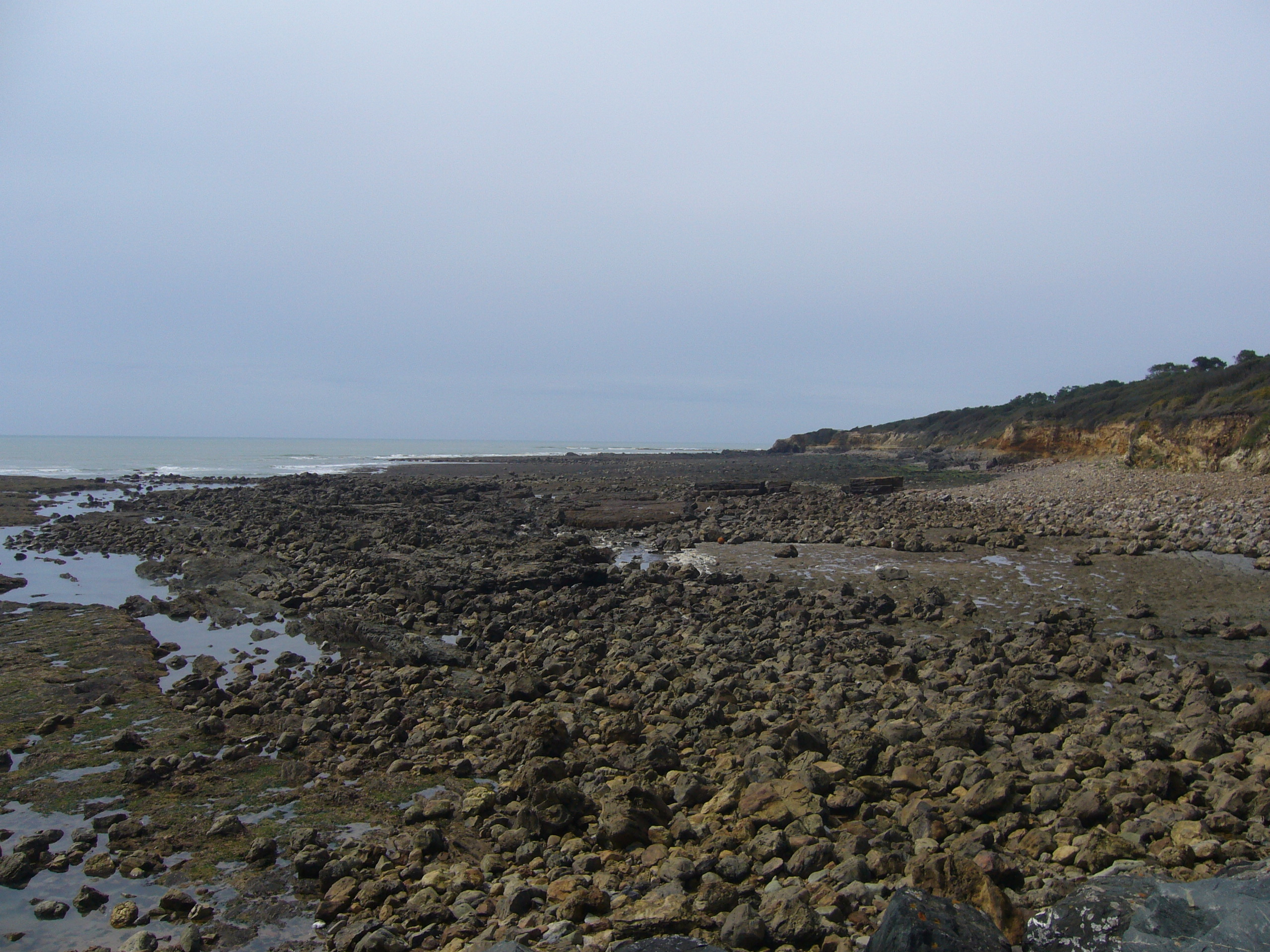 Photos de Port Bourgenay, Talmont-Saint-Hilaire